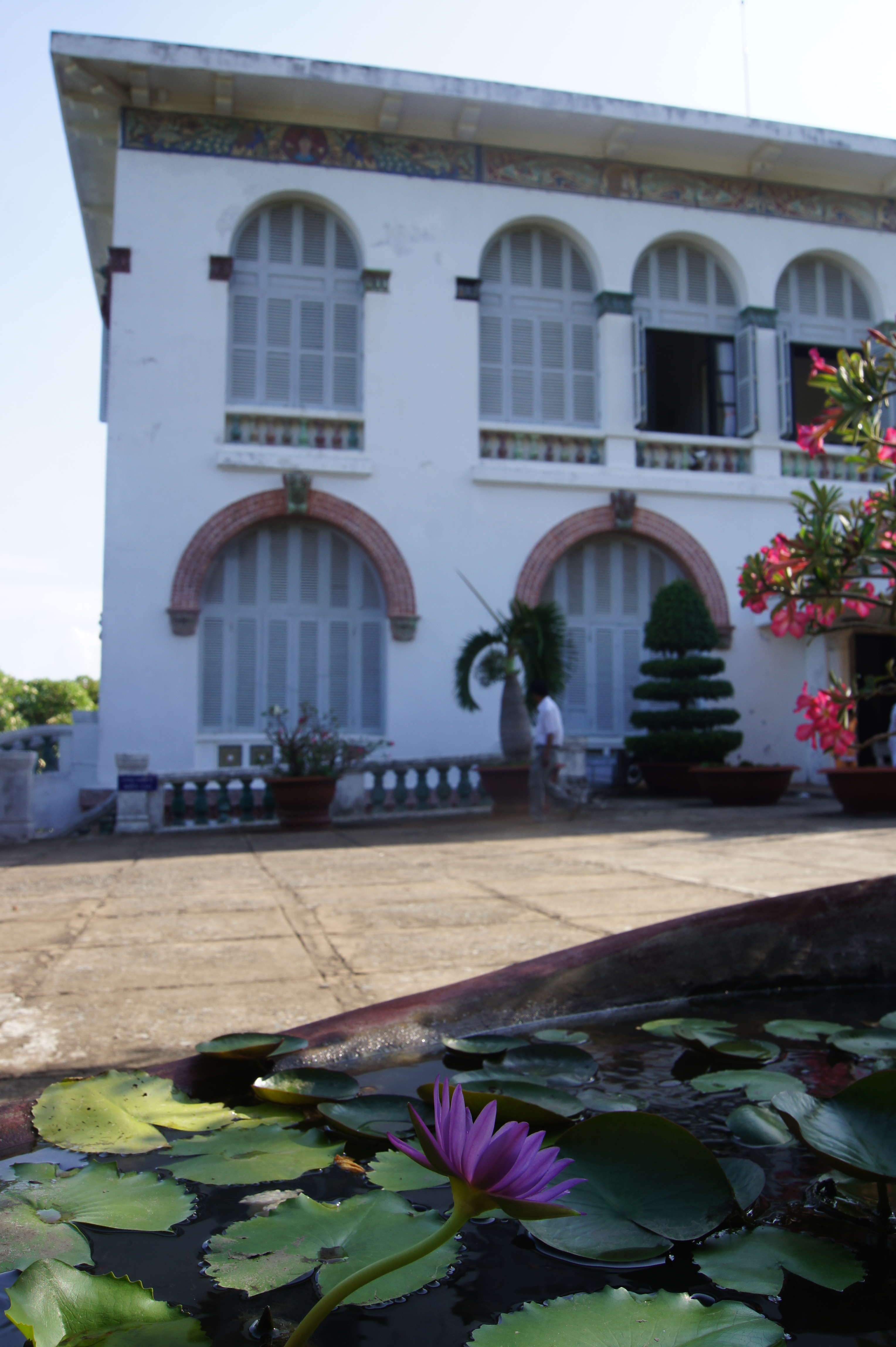 Phía sau Bạch Dinh